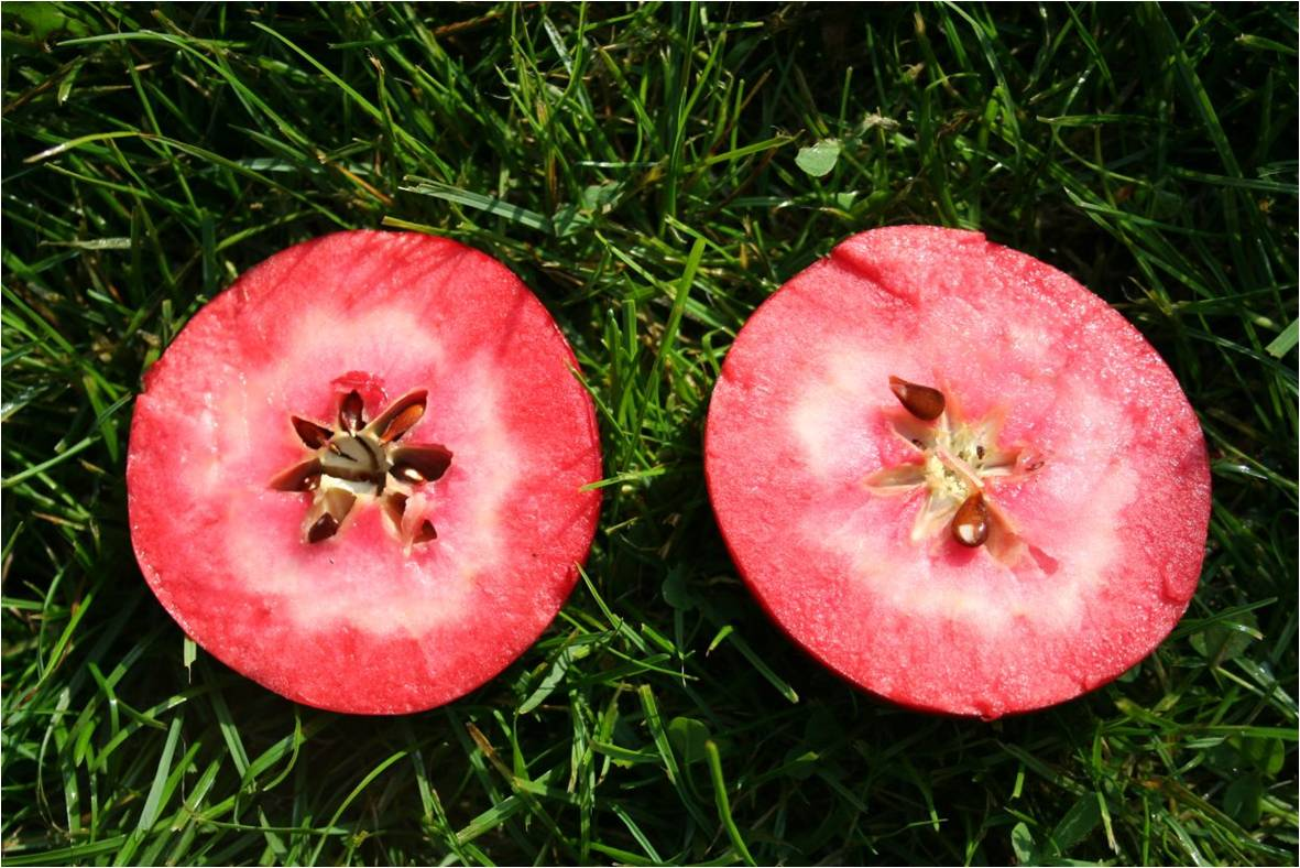 Redlove Era, Neuzüchtung 2010, rotfleischiger Apfel, Züchter: Markus Kobelt